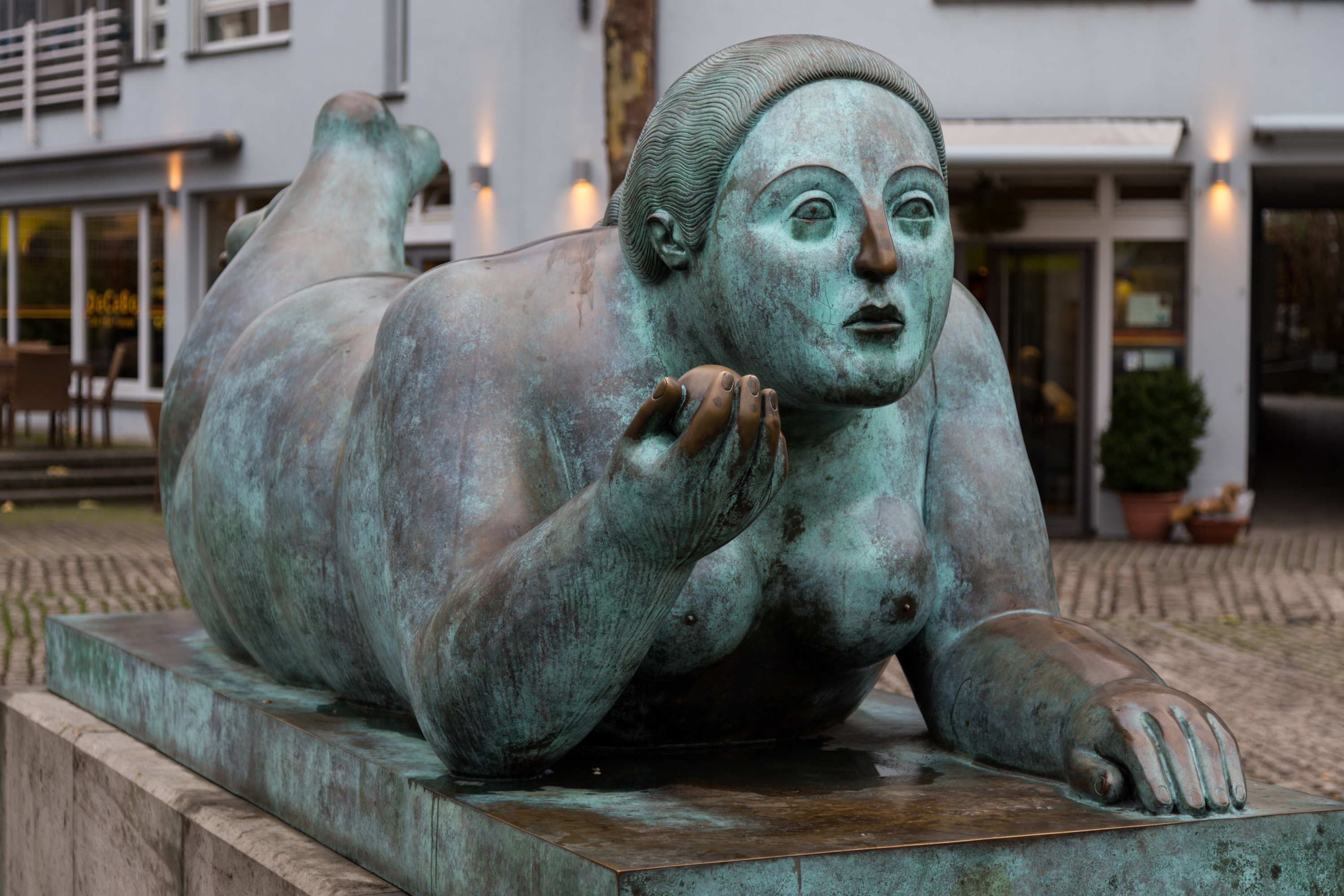 "Liegende mit Frucht" Skulptur von Fernando Botero in Bamberg